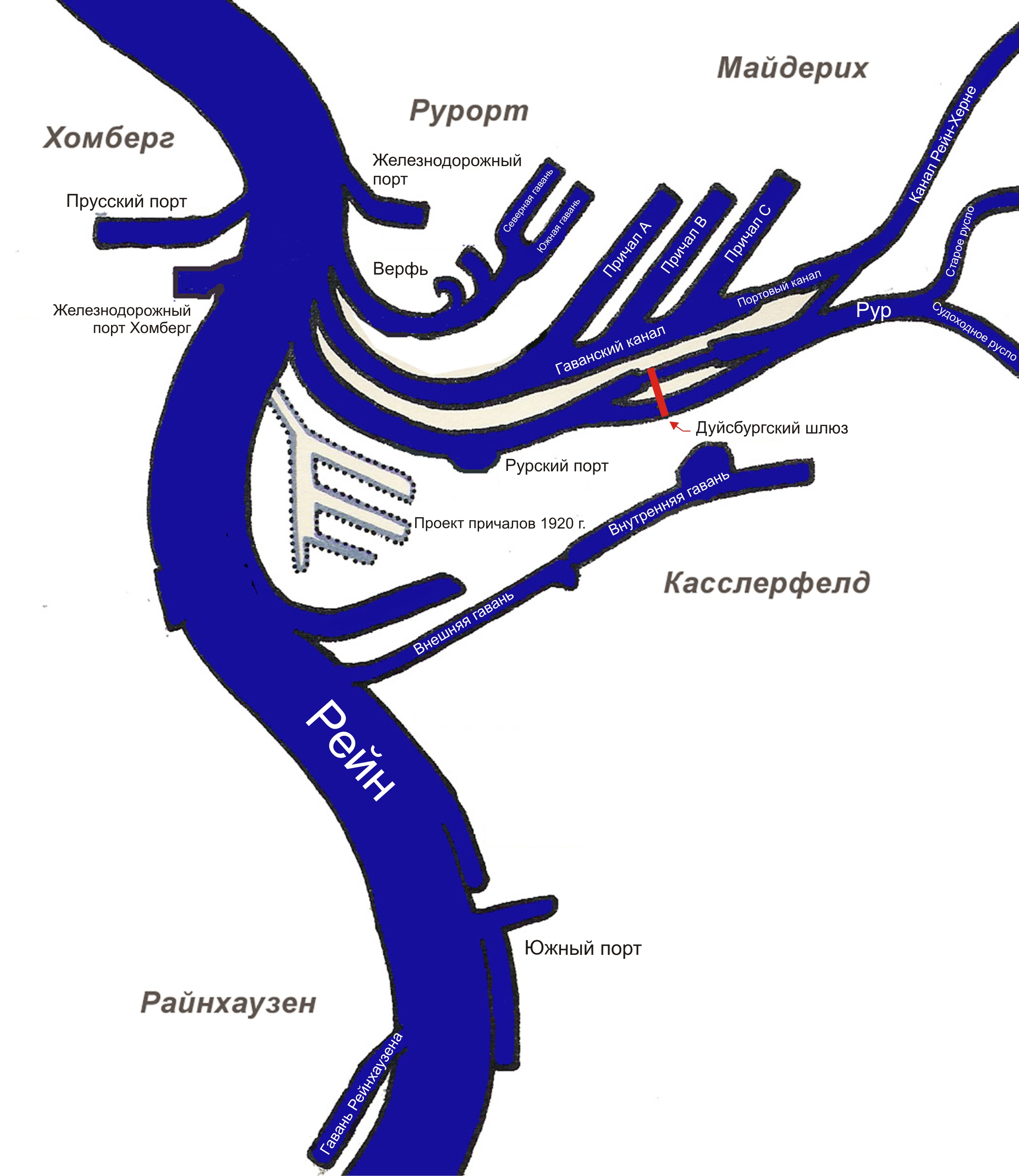 Схема водных путей Дуйсбургского порта